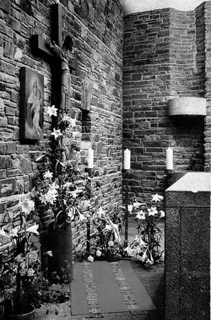 Tumulo del Pe. Kentenich, en la iglesia de la Adoración, Schoenstatt.